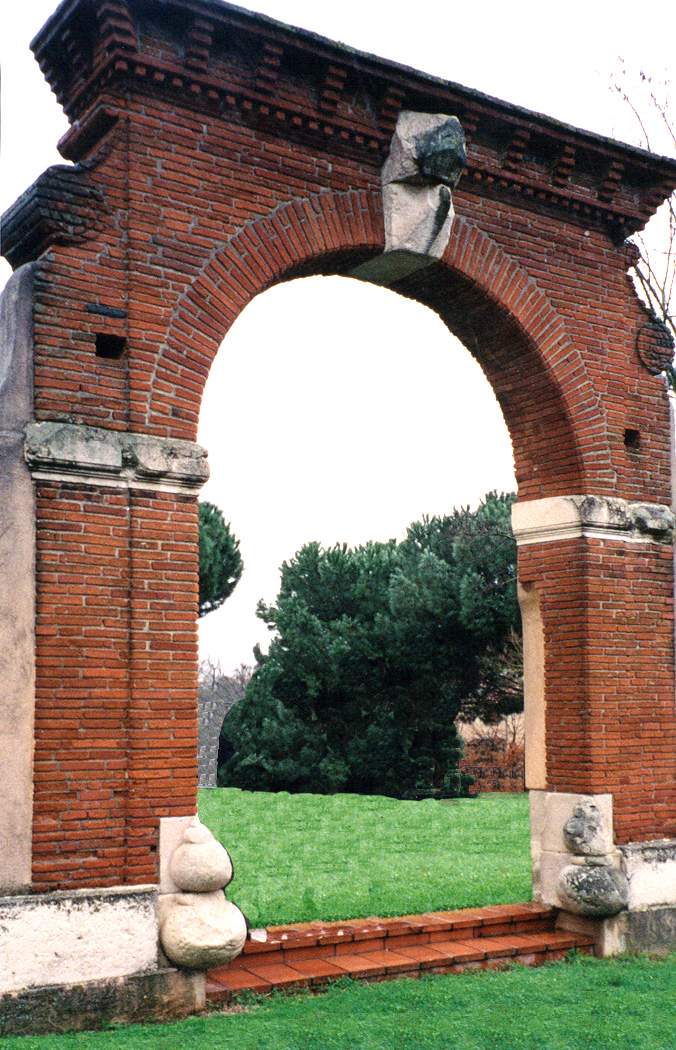 Colomiers (Haute-Garonne, Midi-Pyrénées, France) - Portail du château des Raspaud.